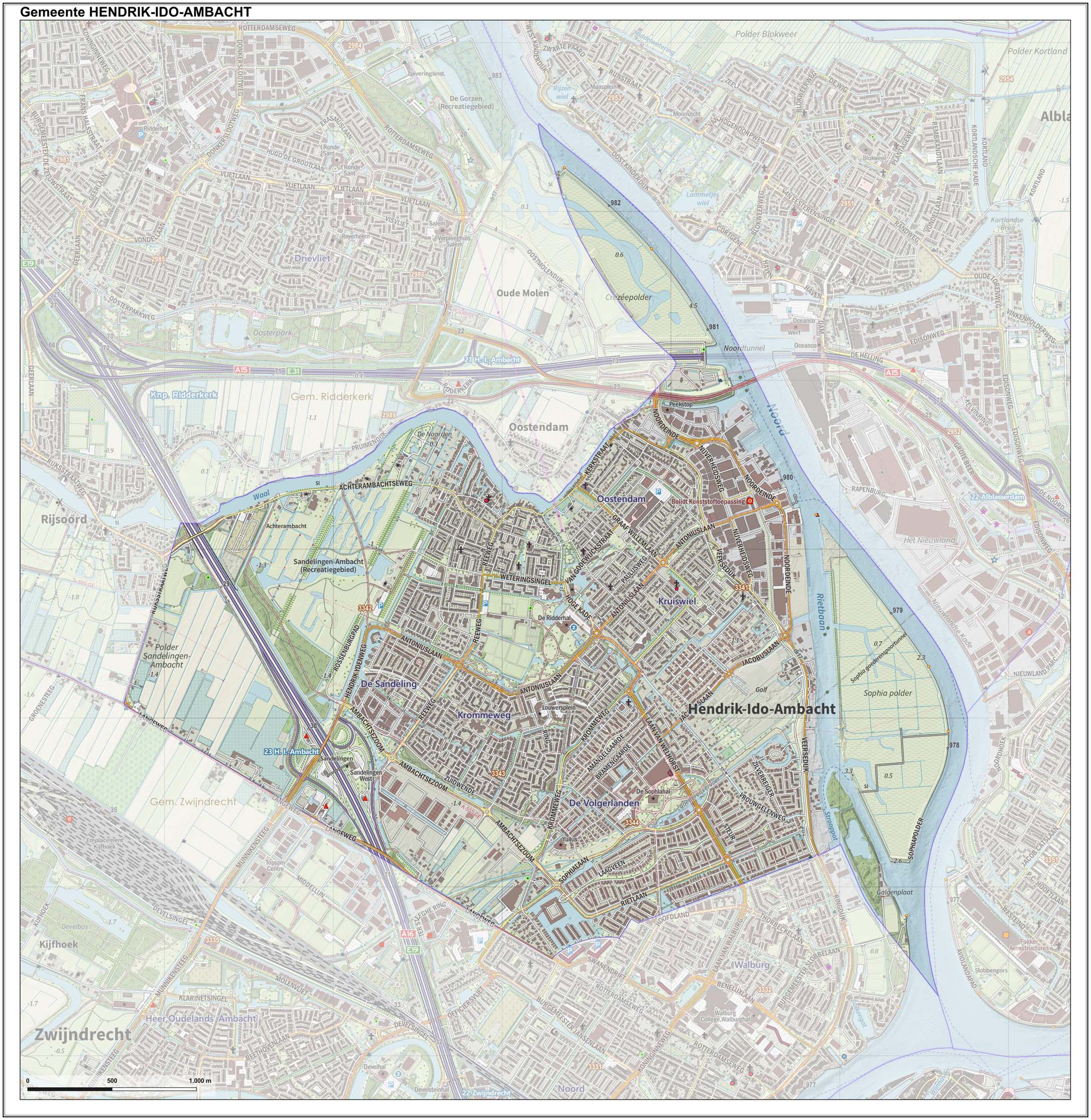 Topografische gemeentekaart. Resolutie: 400 pixels/km. Kaartbeeld samengesteld uit de open geodata van de Top10NL en Top25namen (Kadaster), Creative Commons-BY licentie. Gebouwvlakken uit open geodata BAG extract. Wegen uit de OpenStreetMap, OpenStreetMap community. Reliëfschaduw uit de Actuele Hoogtekaart AHN2. Samenstelling en kleurenschema: Jan-Willem van Aalst, met QGIS. Zie ook de Legenda.